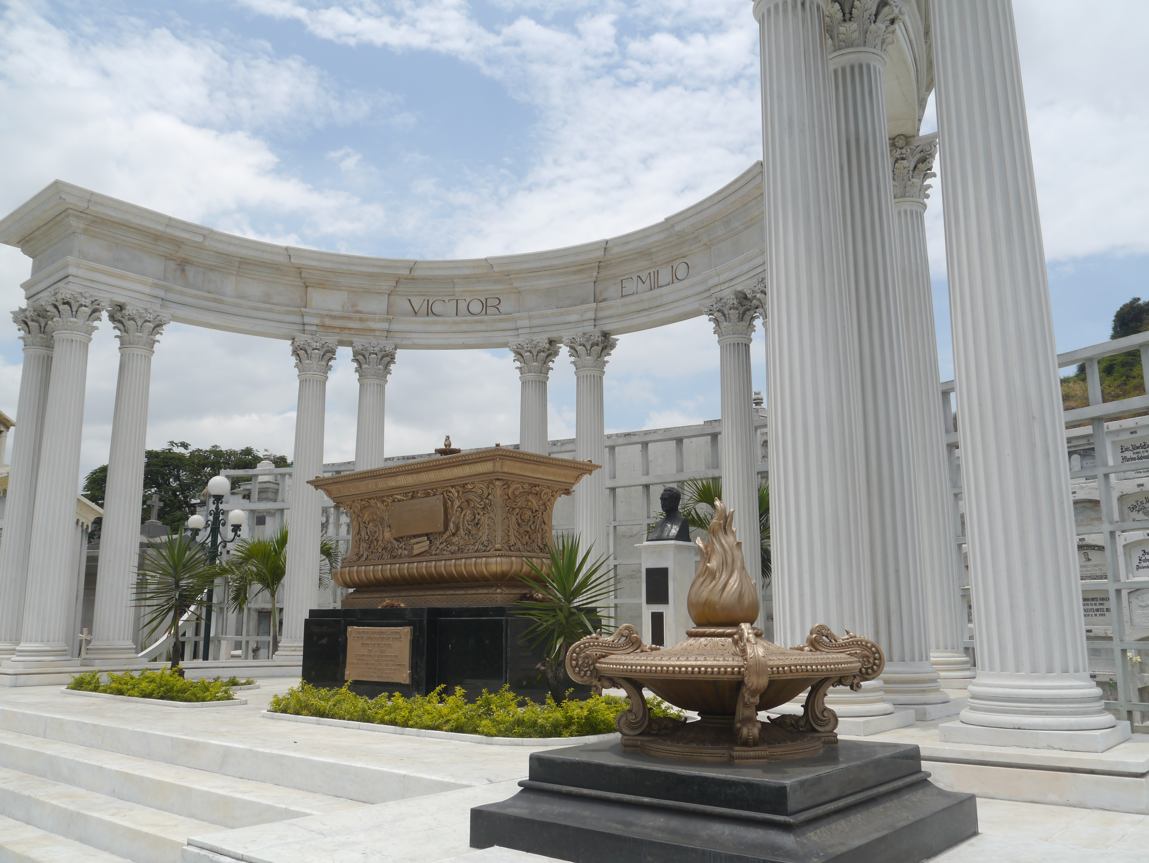 En el Cementerio General de Guayaquil